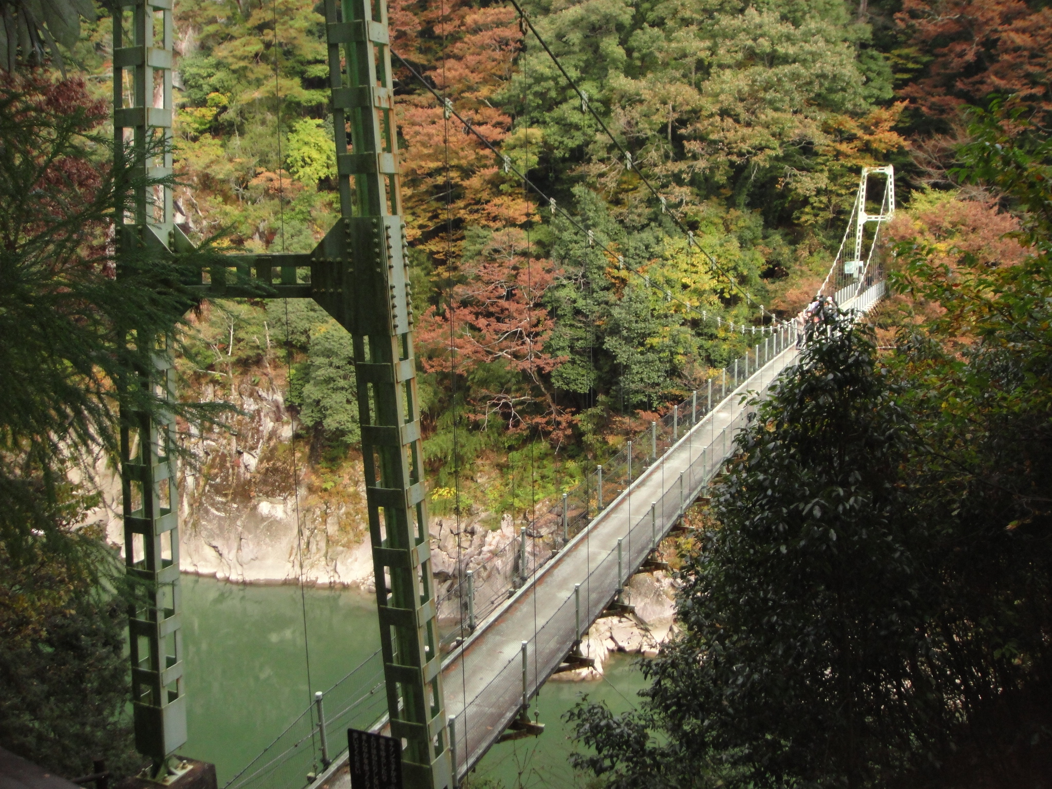 天竜峡の天竜川に架かる吊り橋のつつじ橋